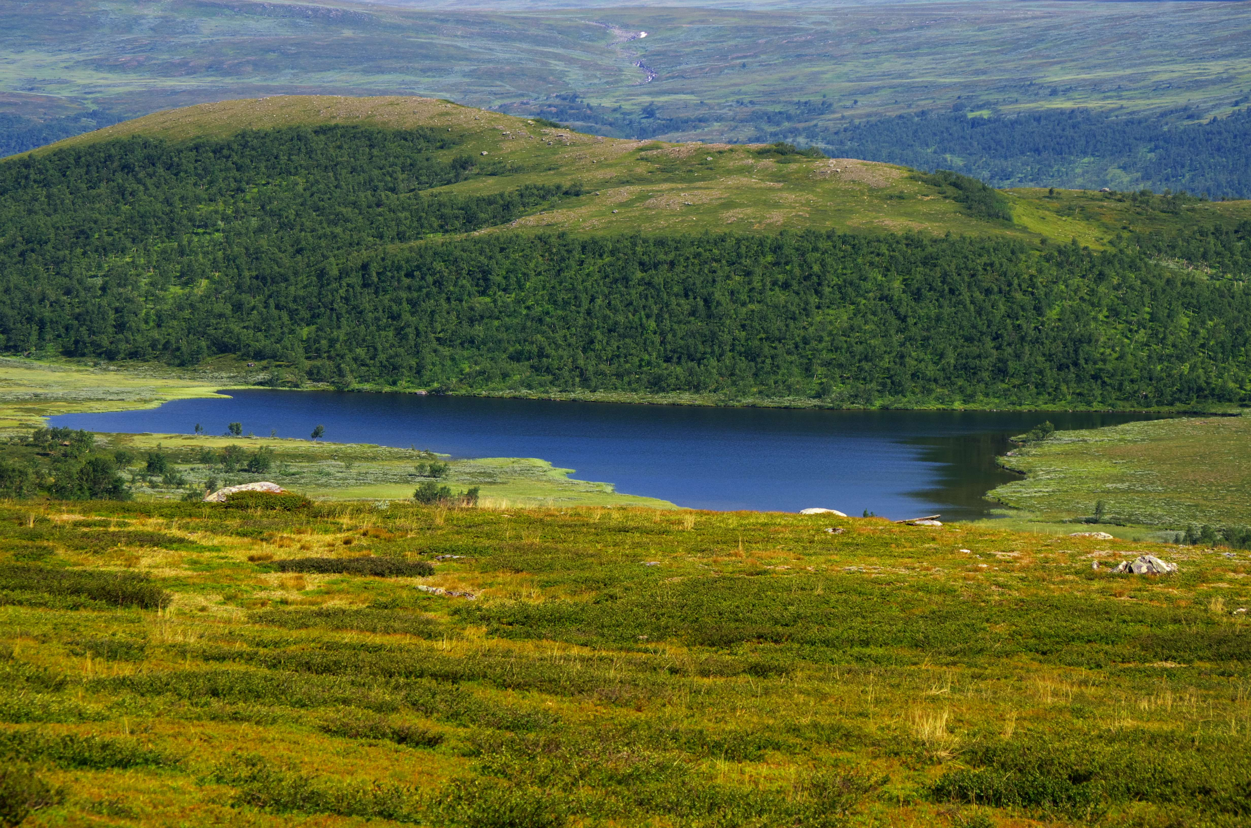 Vuotsjaure eller Vuoddsjávrátje är en sjö i Sorsele kommun i Lappland i Sverige.